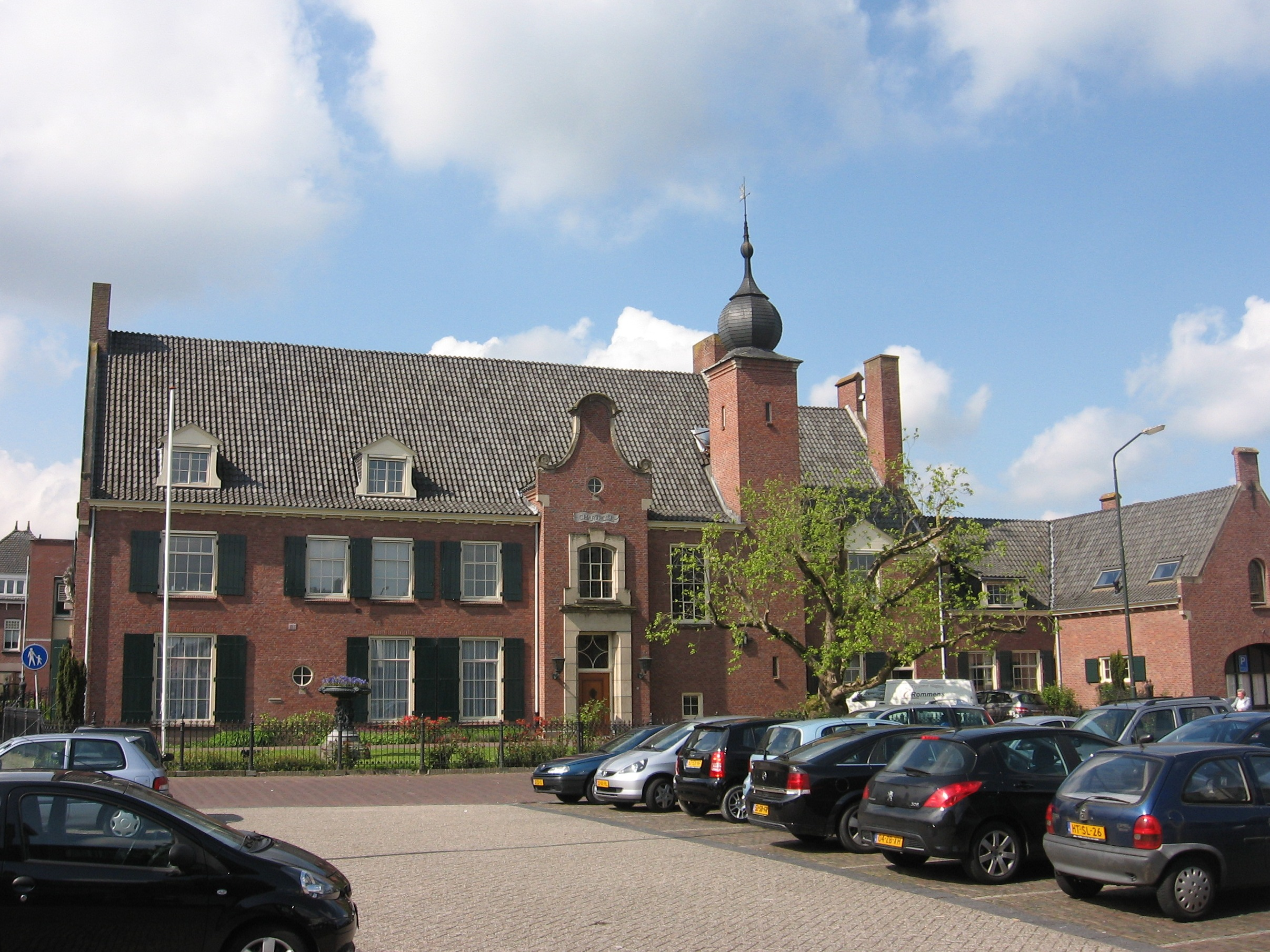 Raamsdonksveer - RM520054.jpg, rijksmonument, gemeentehuis